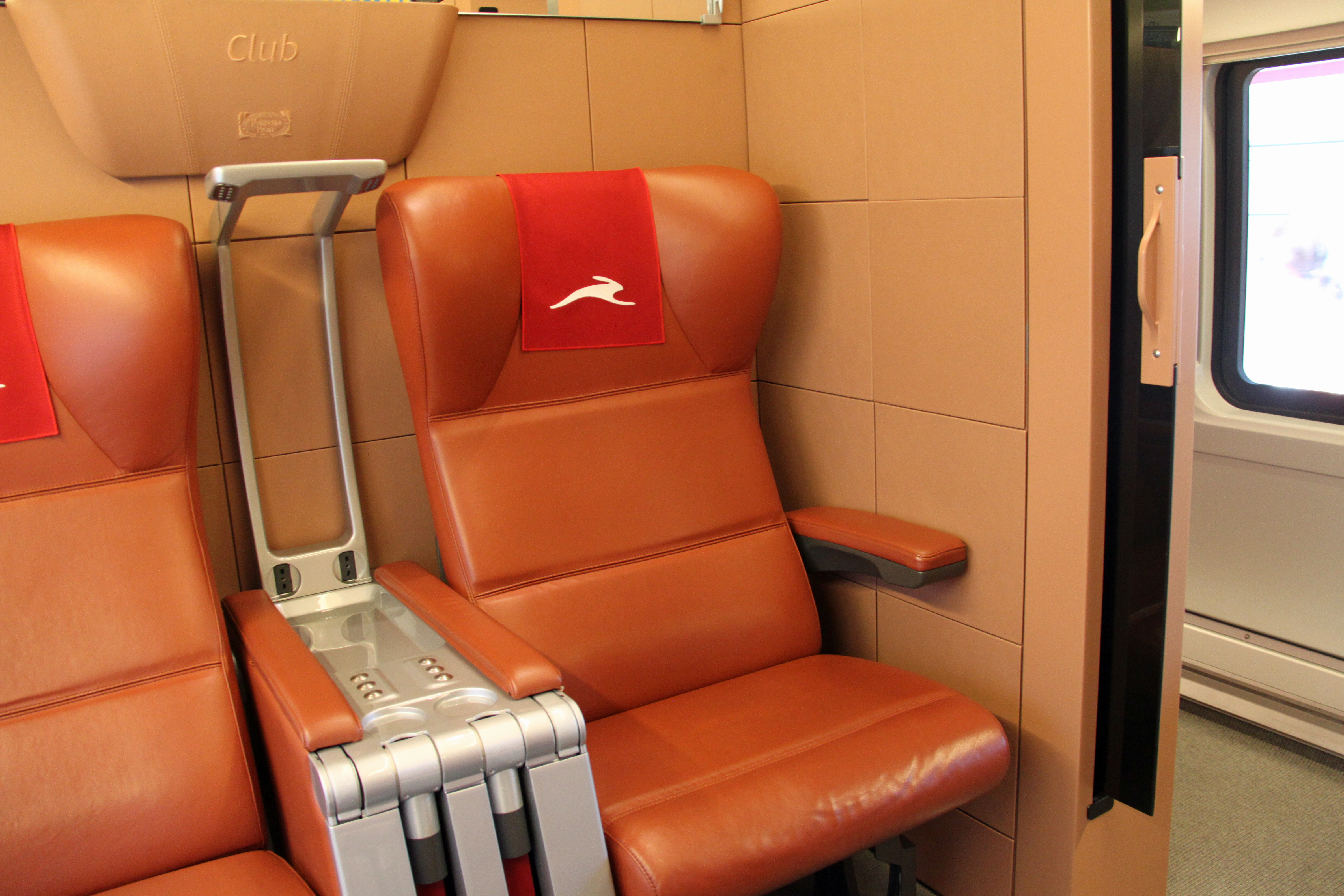 Interieur van de .Italo van NTV, de particuliere hogesnelheidstrein in Italië.